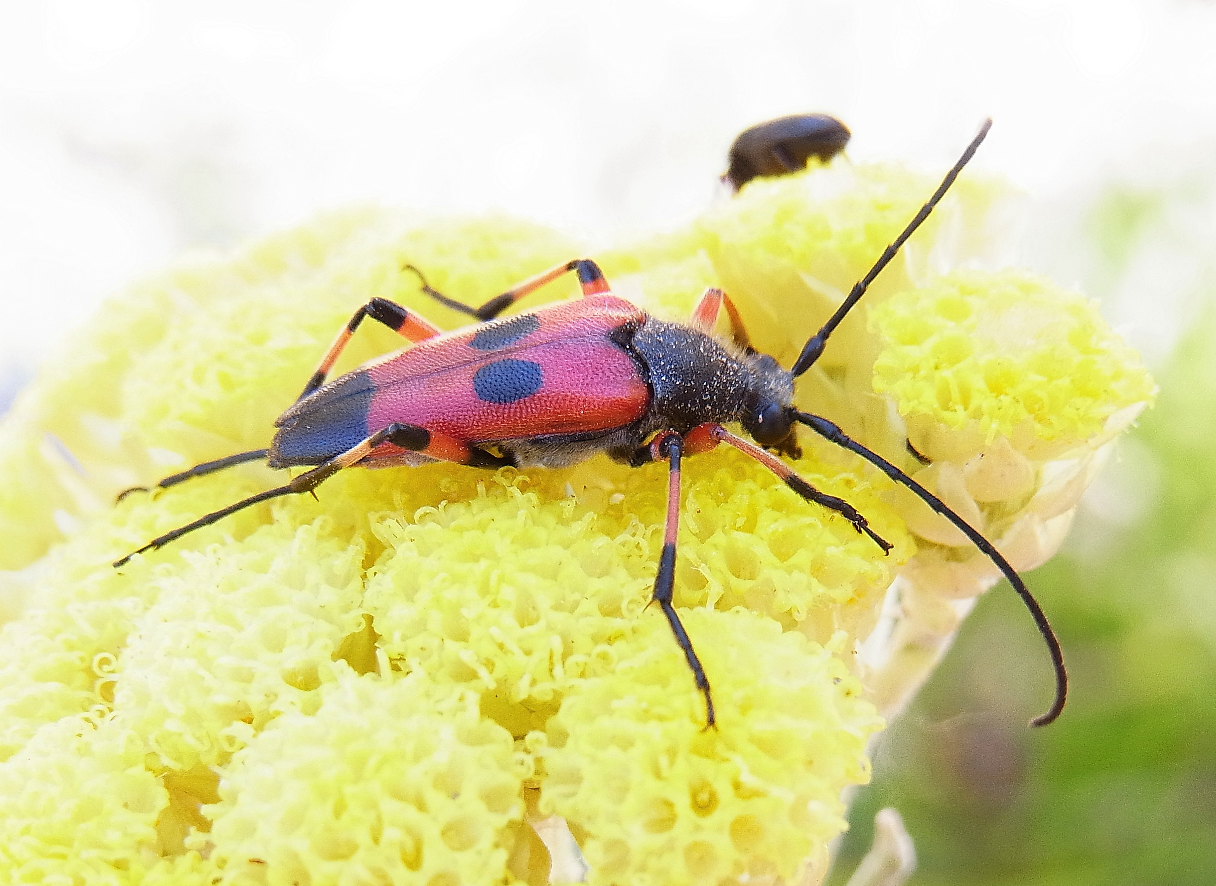 Nustera distigma aus Spanien, bei Caspe, Zaragosa, Katalonien, am 1. Juni 2013